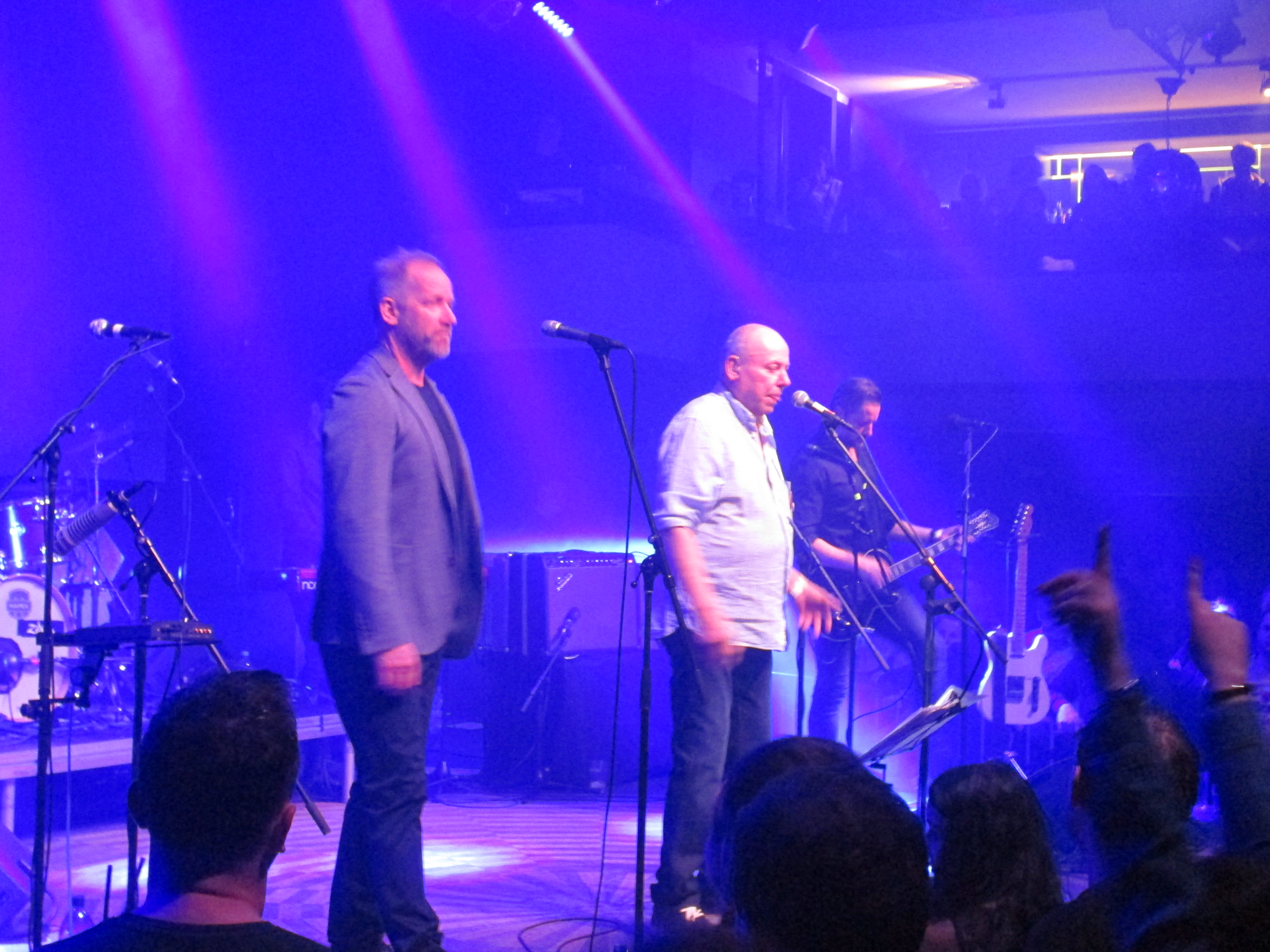 Koncert skupiny Michal Ambrož a Hudba Praha 18. 4. 2017 v pražském Lucerna baru